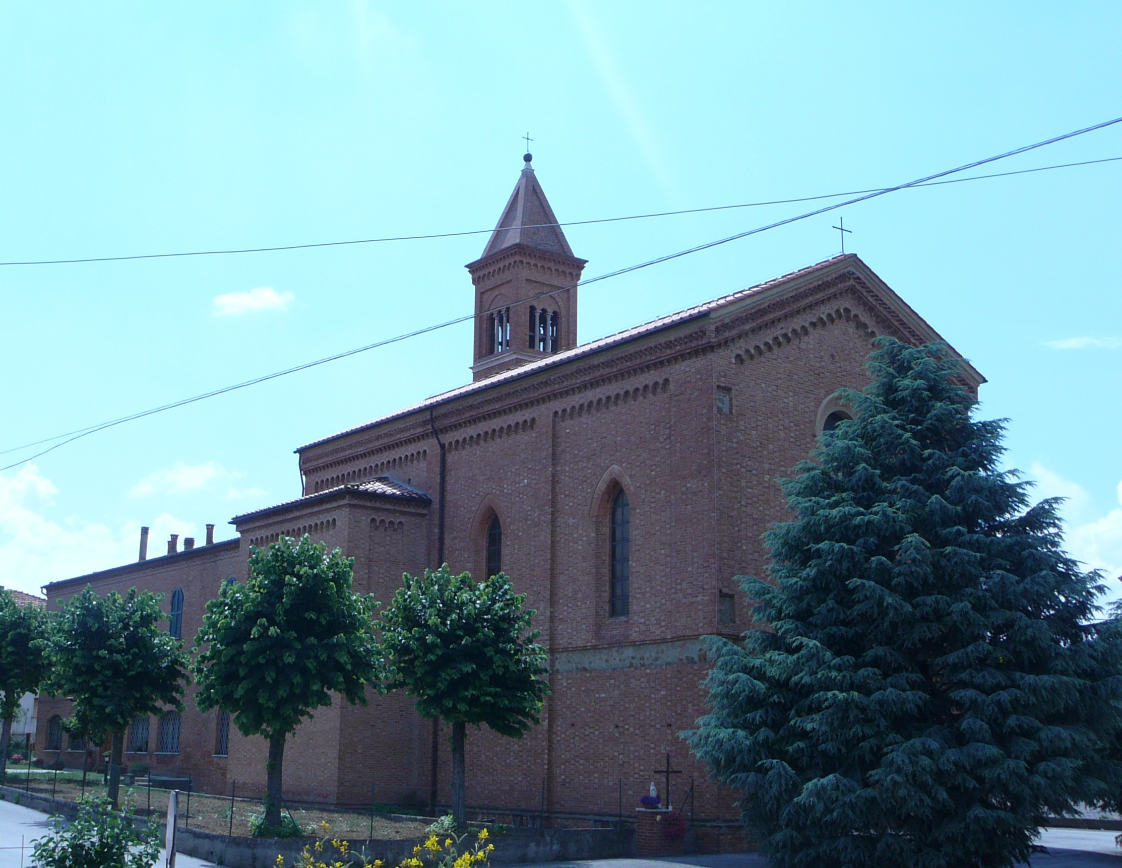 Chiesa del Sacro Cuore di Montepulciano Stazione (Siena)